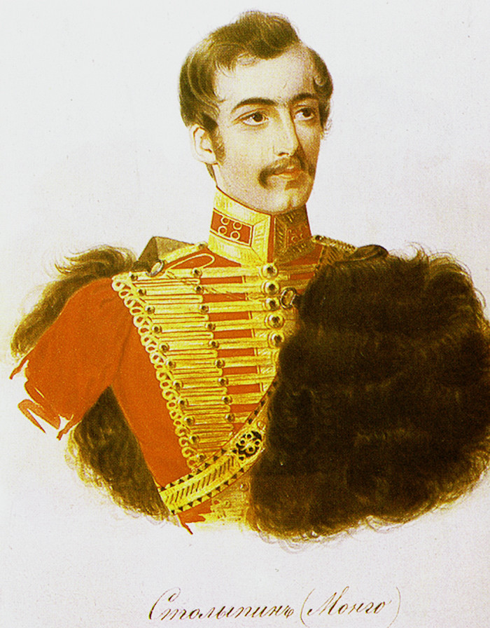 Алексей Аркадьевич Столыпин (1816—1858), двоюродный дядя и друг Лермонтова.